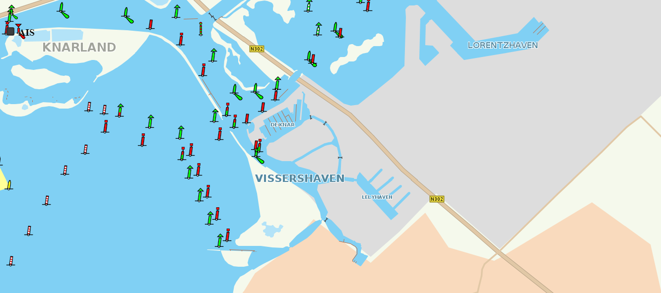 Detail van een waterkaart, omgeving Harderwijk